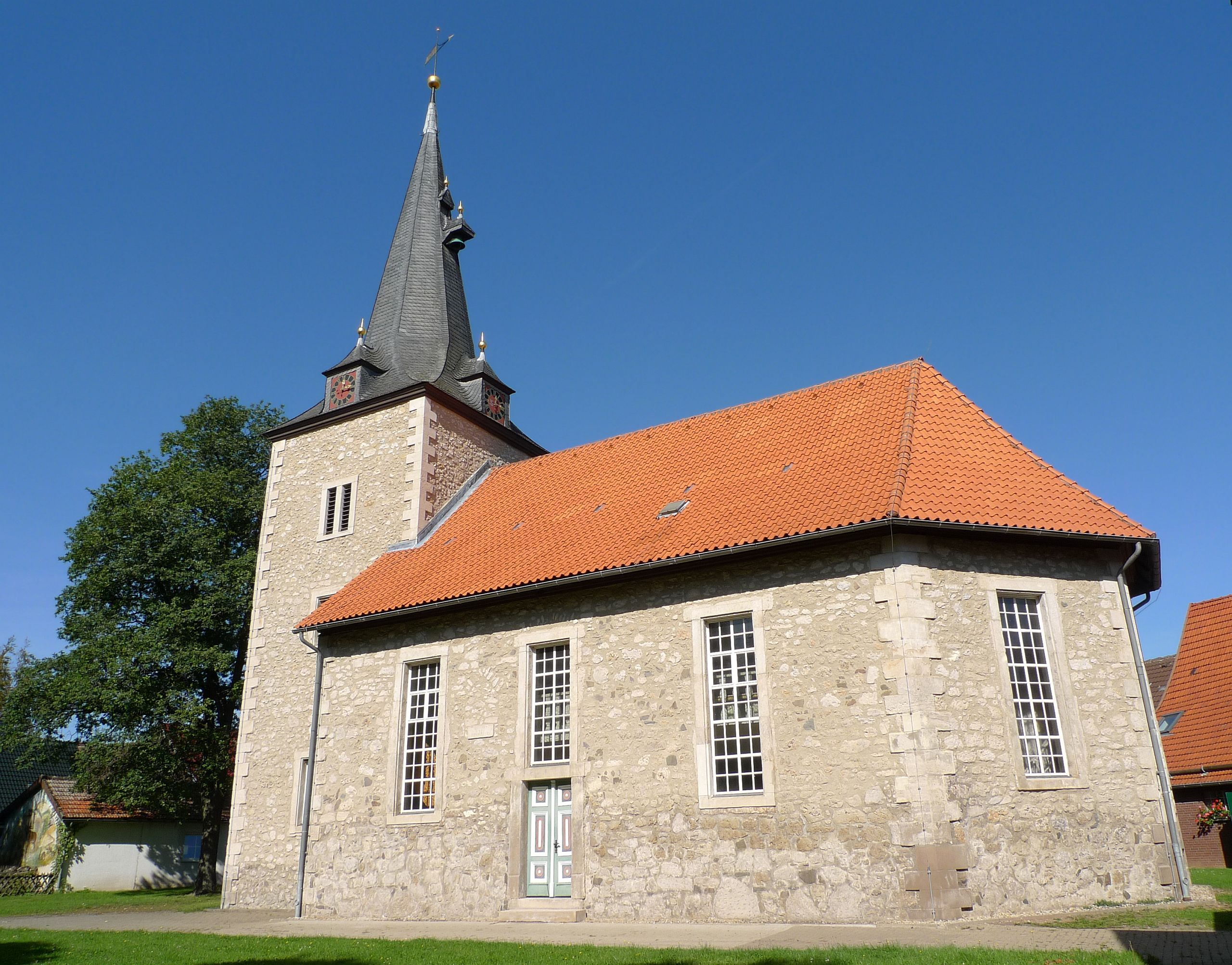 Evangelische St.-Martins-Kirche in Osterhagen, einem Ortsteil von Bad Lauterberg. Die Kirche wurde 1766-67 erbaut und der Kirchturm 1860 vollendet.